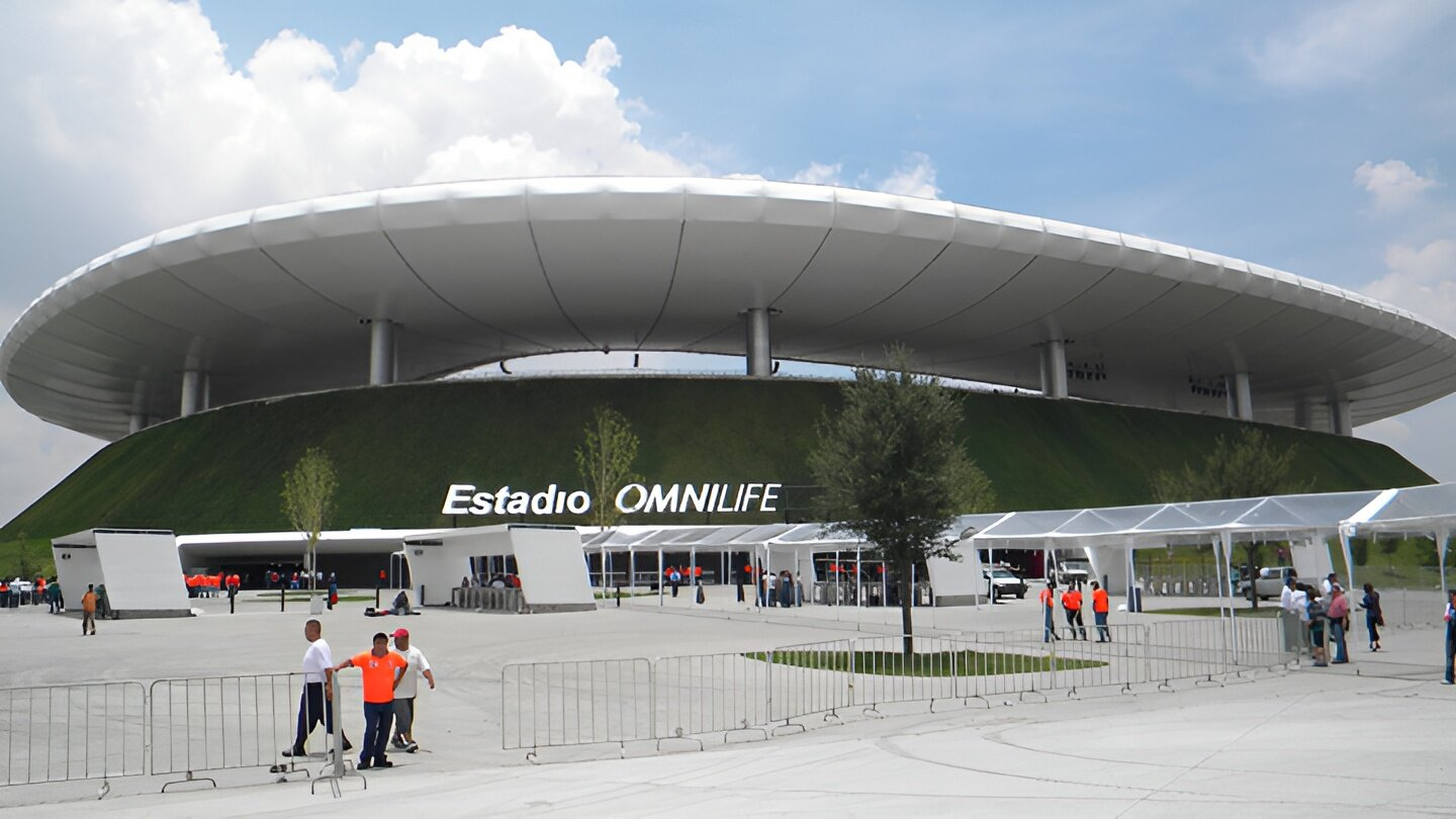 Foto del estadio Omnilife en Guadalajara Jalisco, México